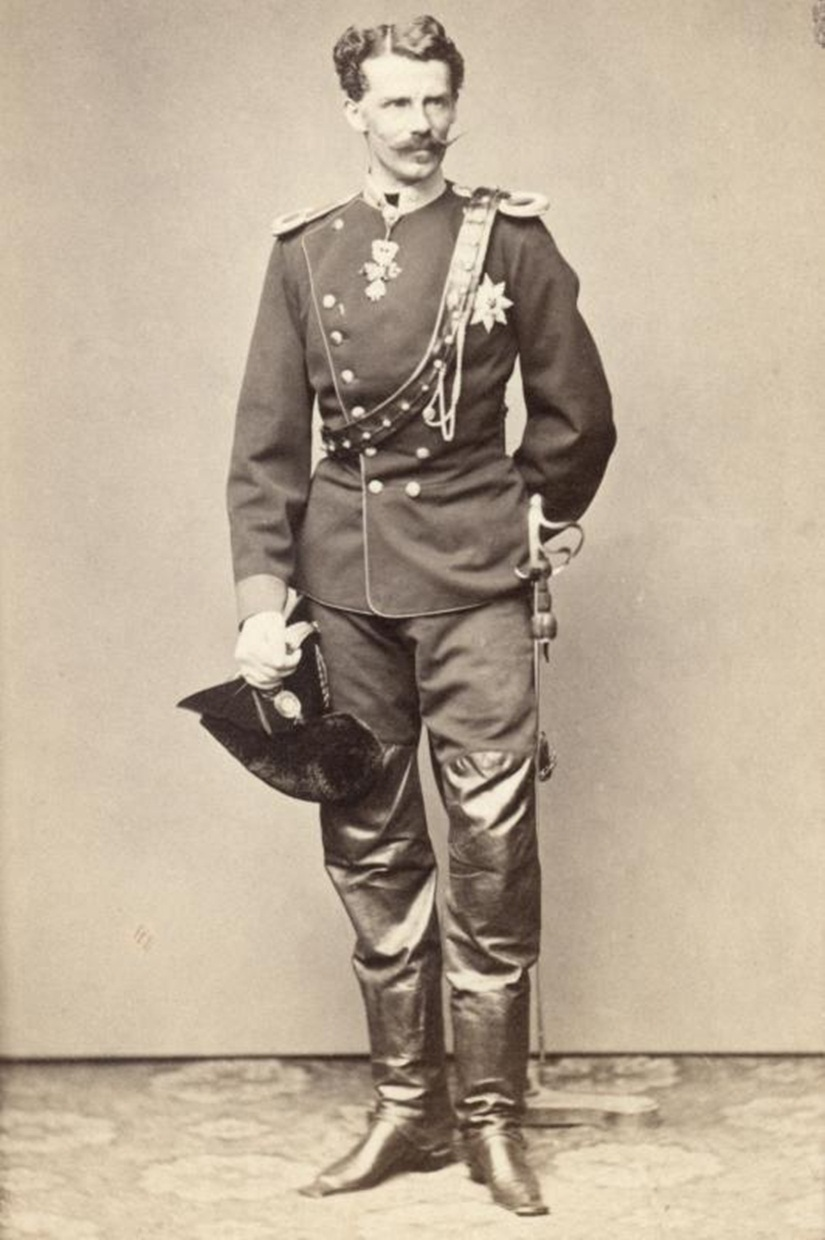 Ludwig Wilhelm, Herzog in Bayern (1831-1920)